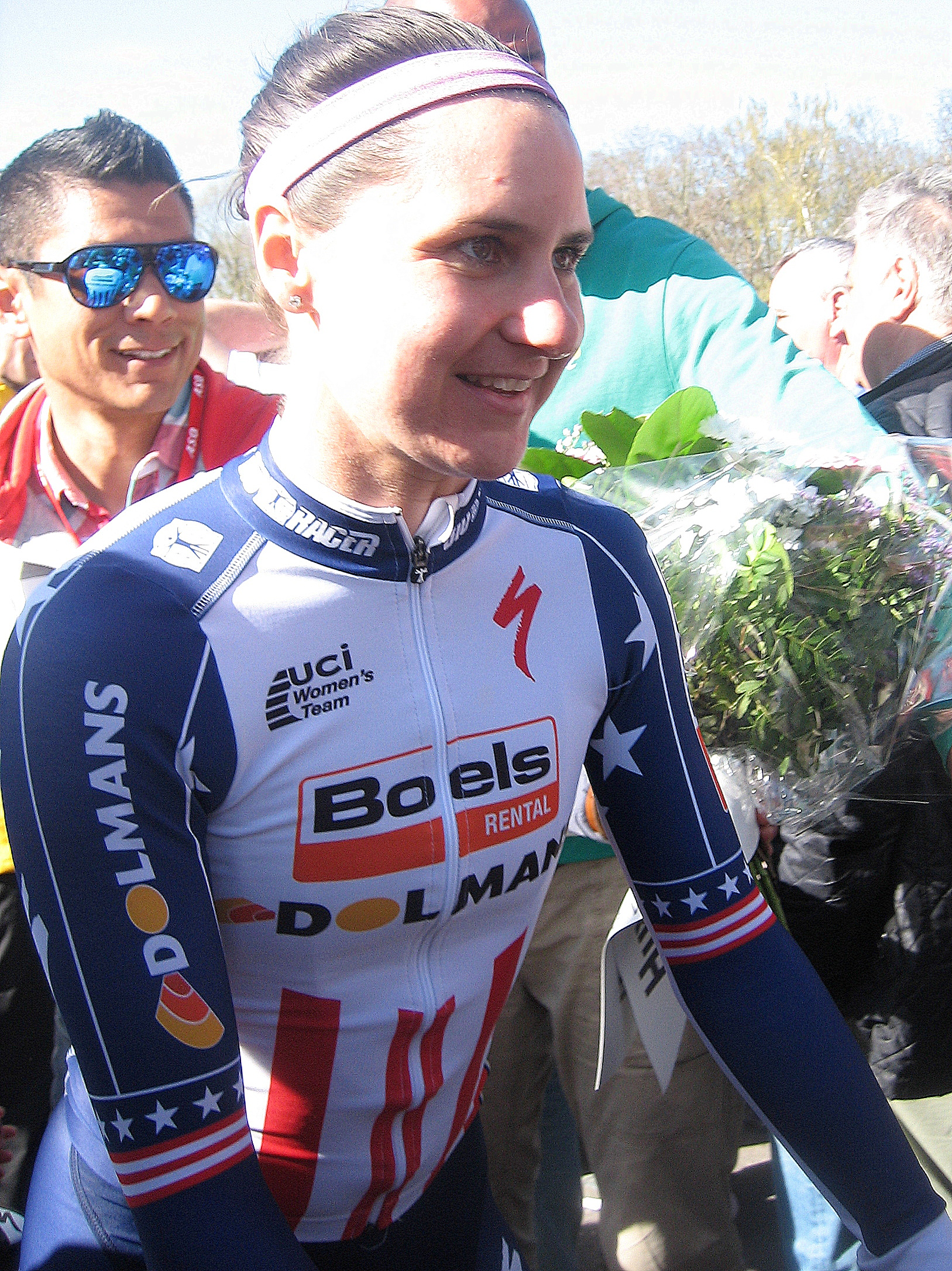 Megan Guarnier (Boels Dolmans) na podium Waalse Pijl 2016